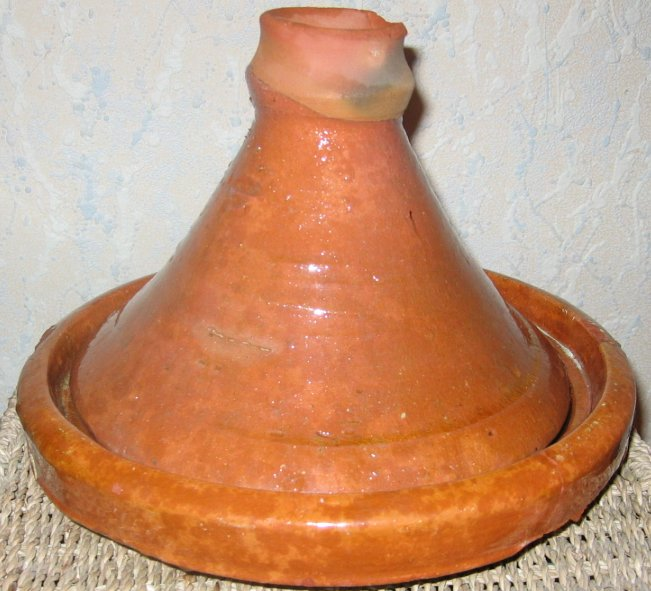 Plat traditionnel à tajine